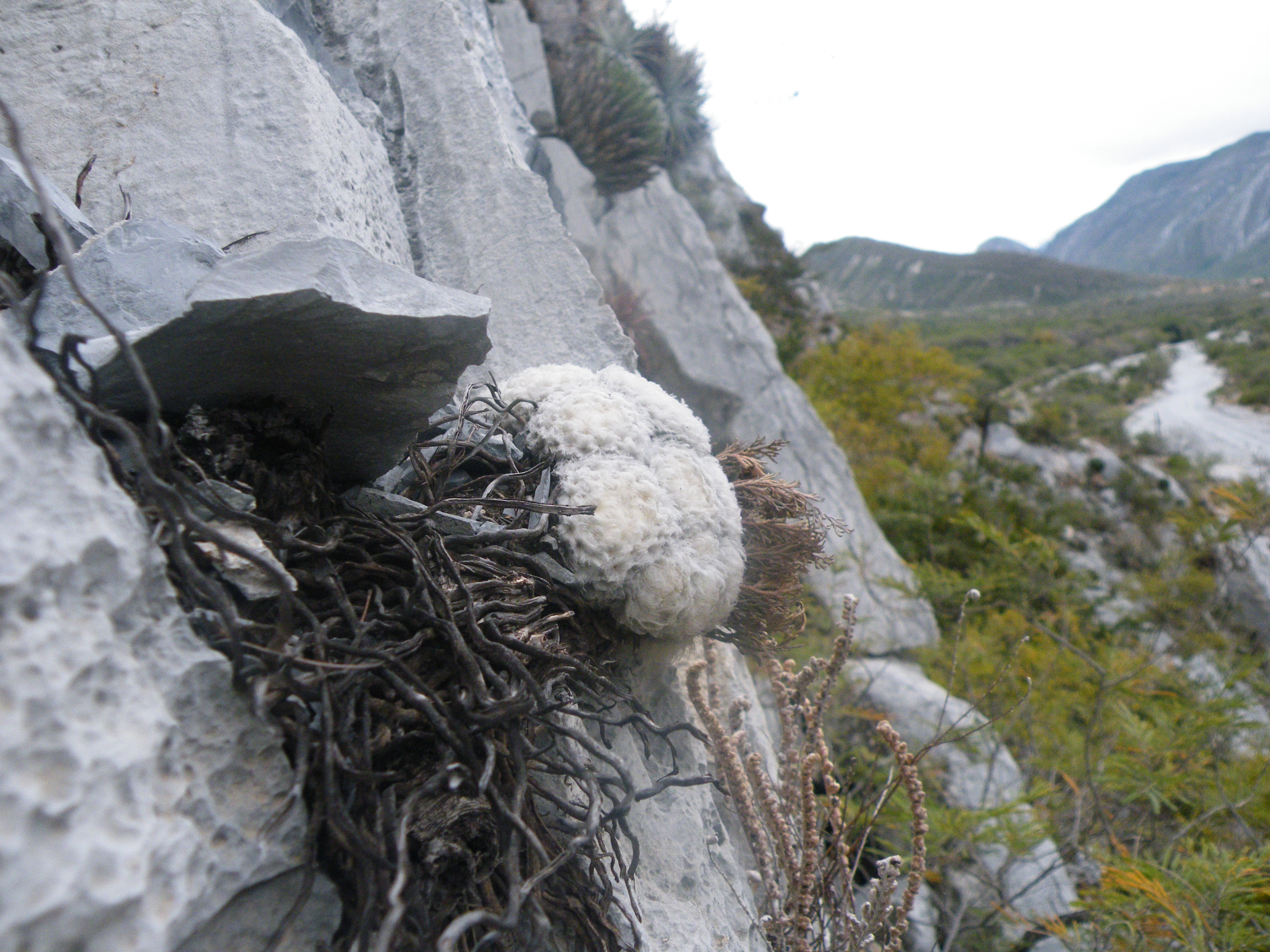 Huasteca Canyon, Nuevo Leon